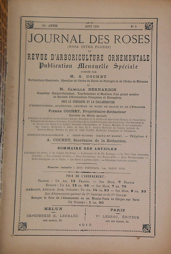 Journal des roses, n°8, ,août 1910, 34e année. Revue mensuelle fondée par S. Cochet et Camille Bernardin.